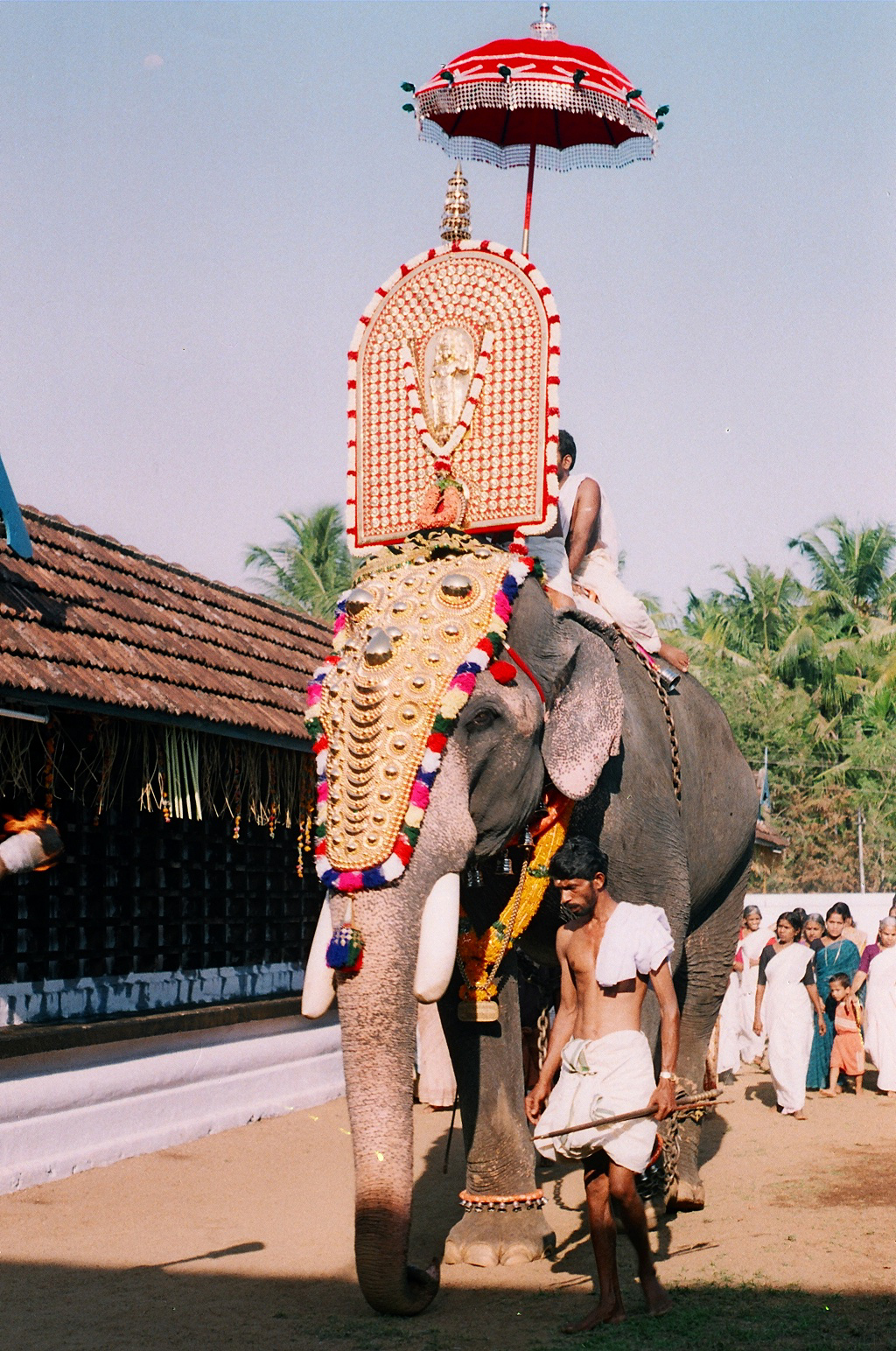 ഗുരുവായൂർ പത്മനാഭൻ (Guruvayoor padmanaban)